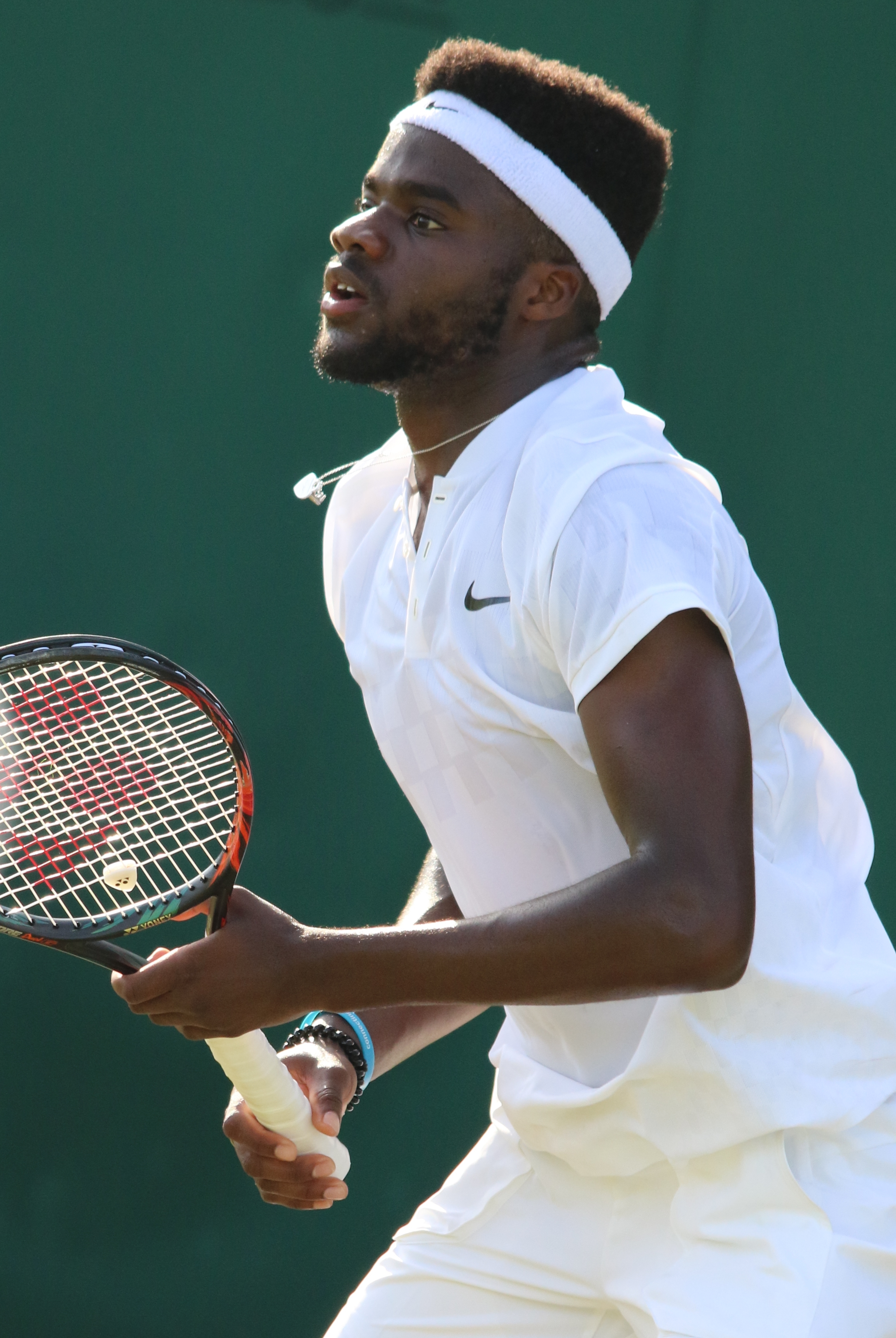 Tiafoe WM17 (13)